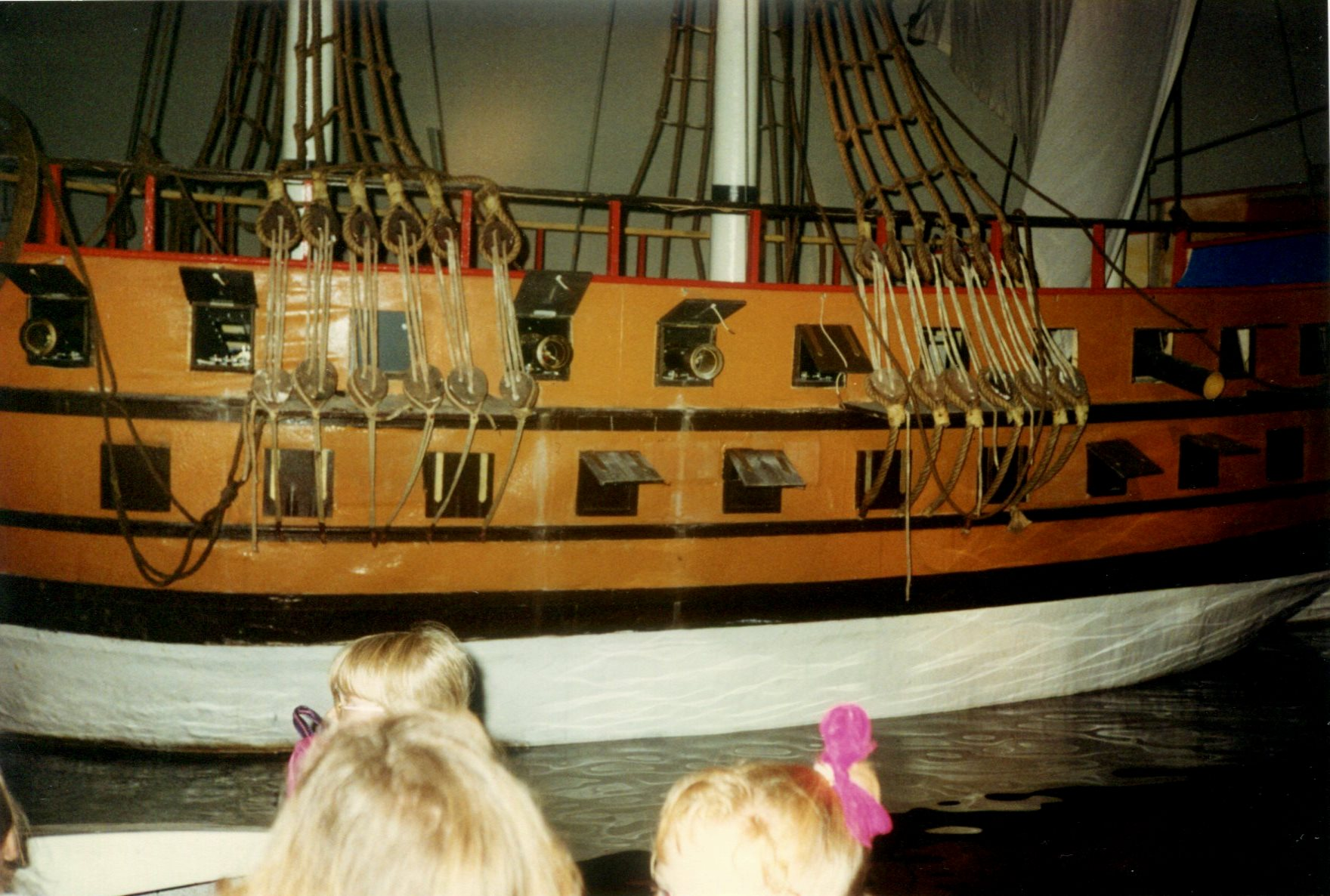 WalibiLicorne